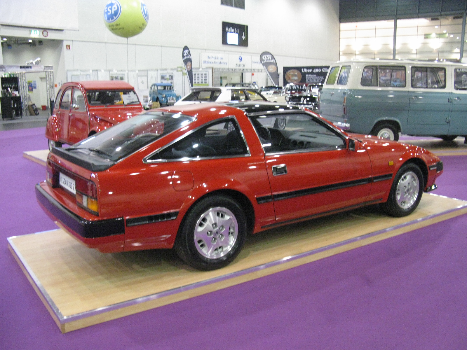 Nissan 300 ZX